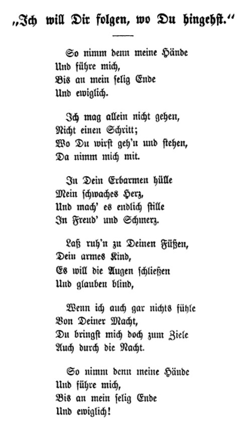 So nimm denn meine Hände, Originaltext 1862